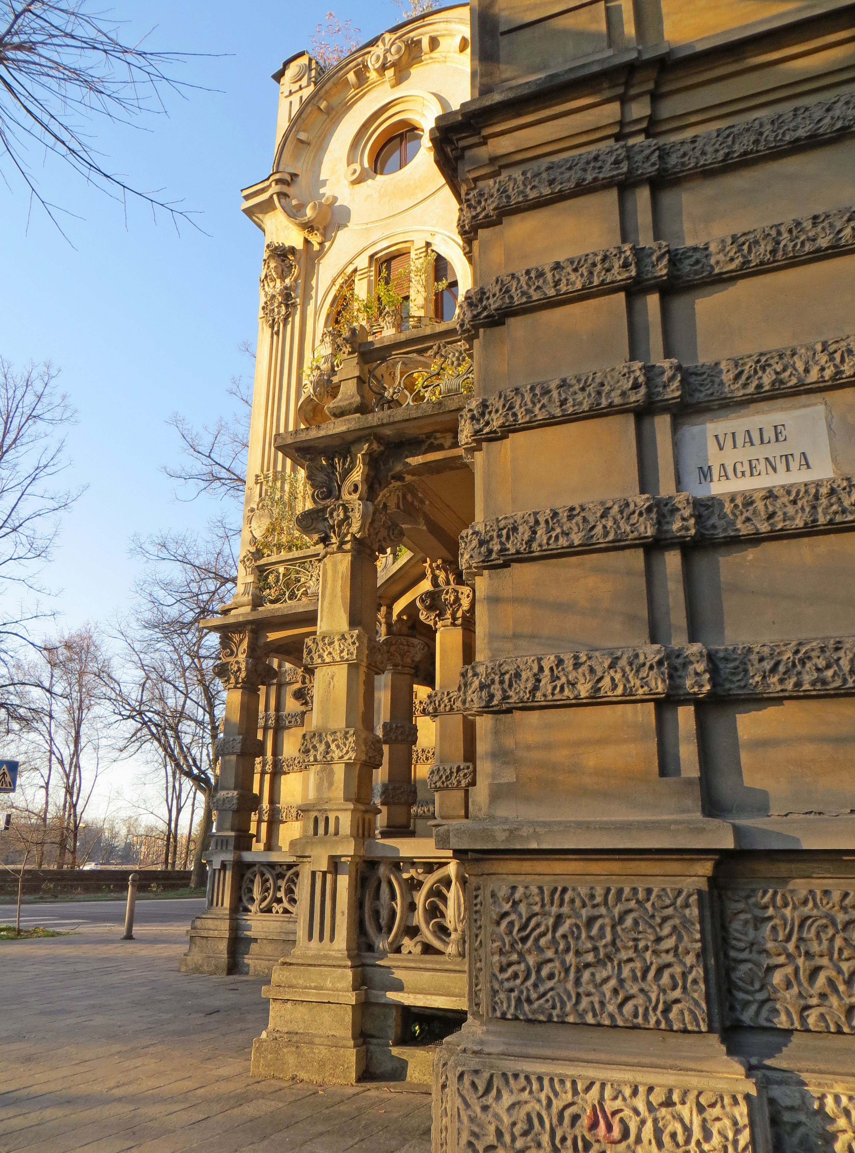 Villino Bonazzi (Parma) - portico (scorcio)